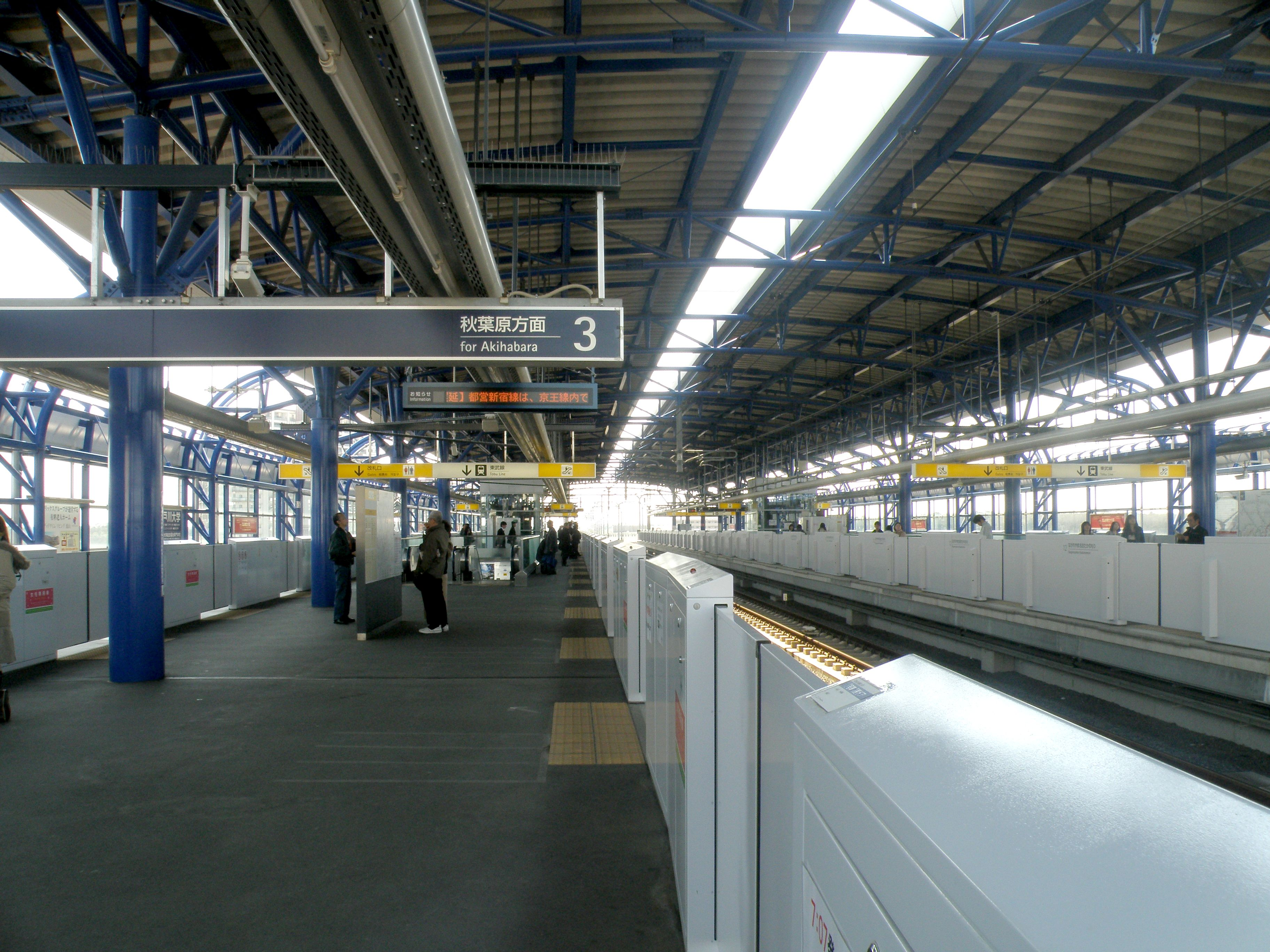 流山おおたかの森駅